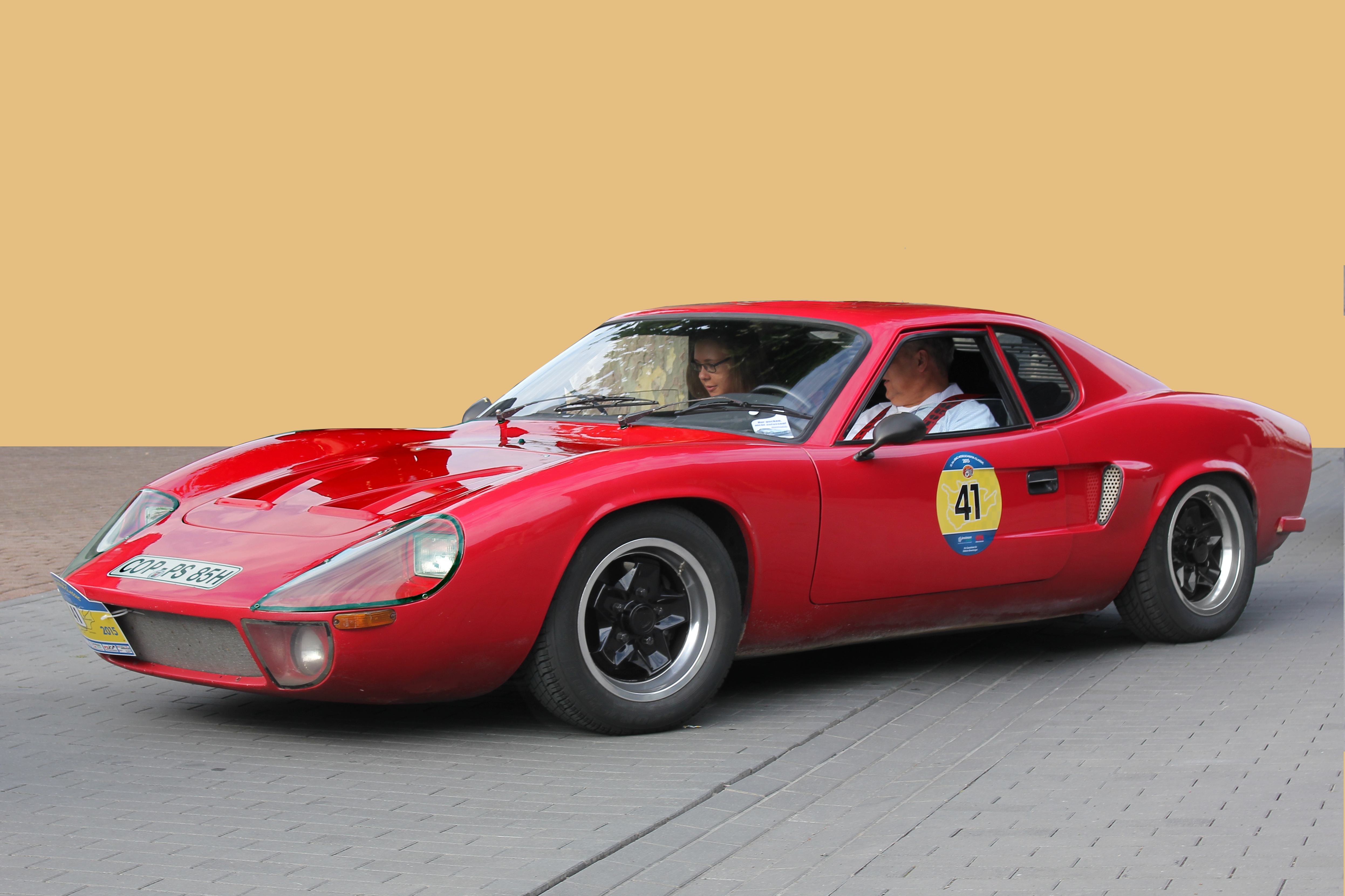 Fiberfab Ft Bonito, Kit Car auf dem Fahrwerk eines VW Käfer von 1967, Räder vom Porsche 911 der 1970er-Jahre. Maße und Gewicht: 3350 mm lang, 1680 mm breit, 680 kg. Der Bonito wurde 1969 vorgestellt und bis 1979 gebaut.